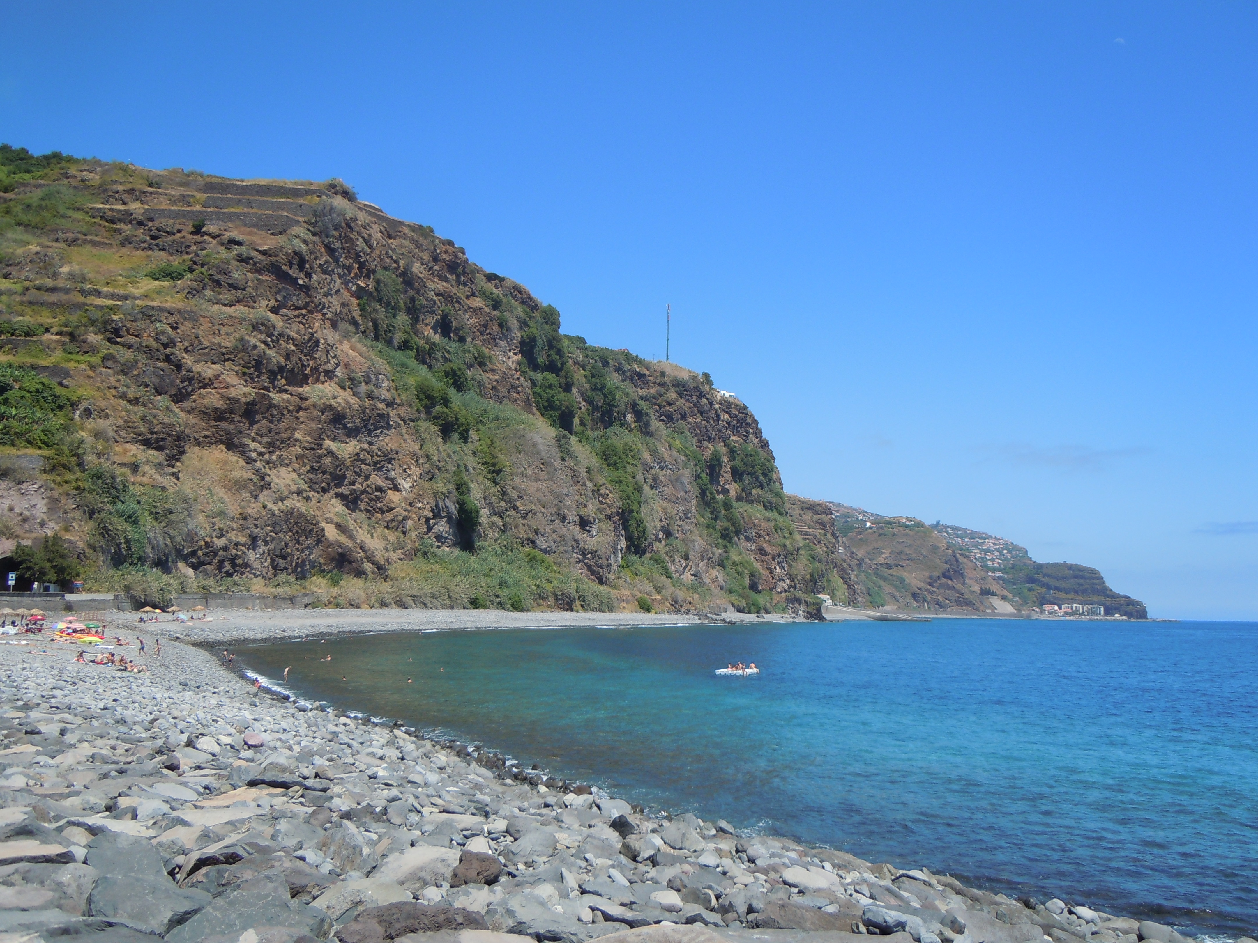 Lugar de Baixo, vue de la plage en direction de l'Est, Madere.